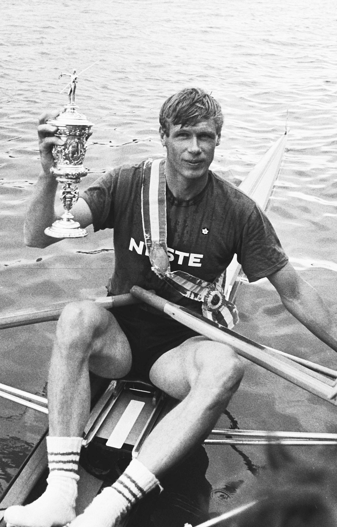 Roeien: Koninklijke Hollandbeker (Amsterdam); winnaar Karpinen (Finland) met beker